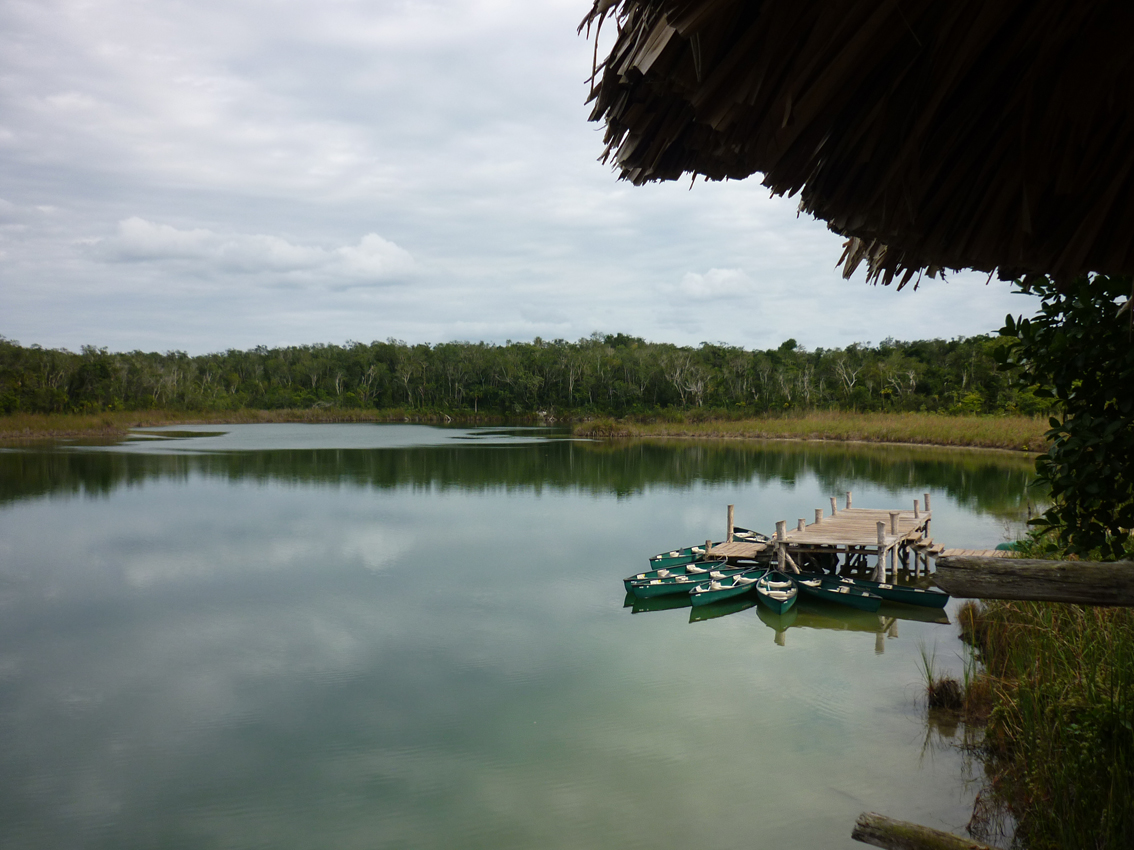 Laguna de Pacchen, en Pacchen Quintana Roo. Area Protegida por Ejidatarios